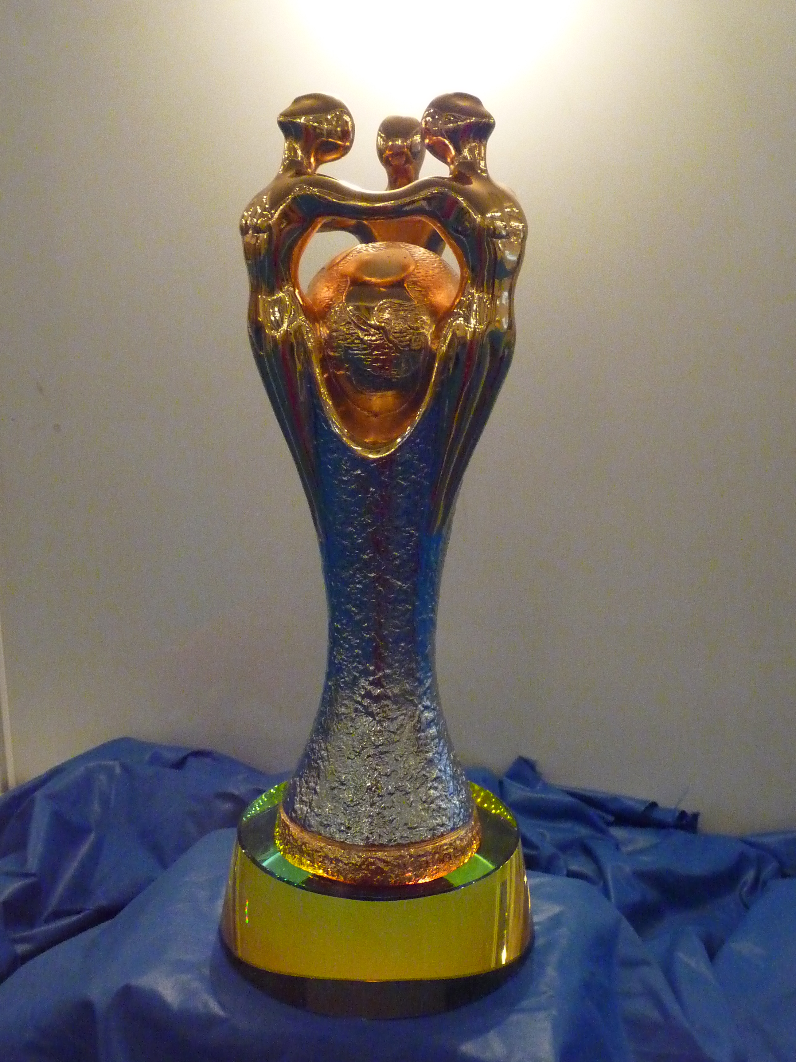 Copa de la Paz